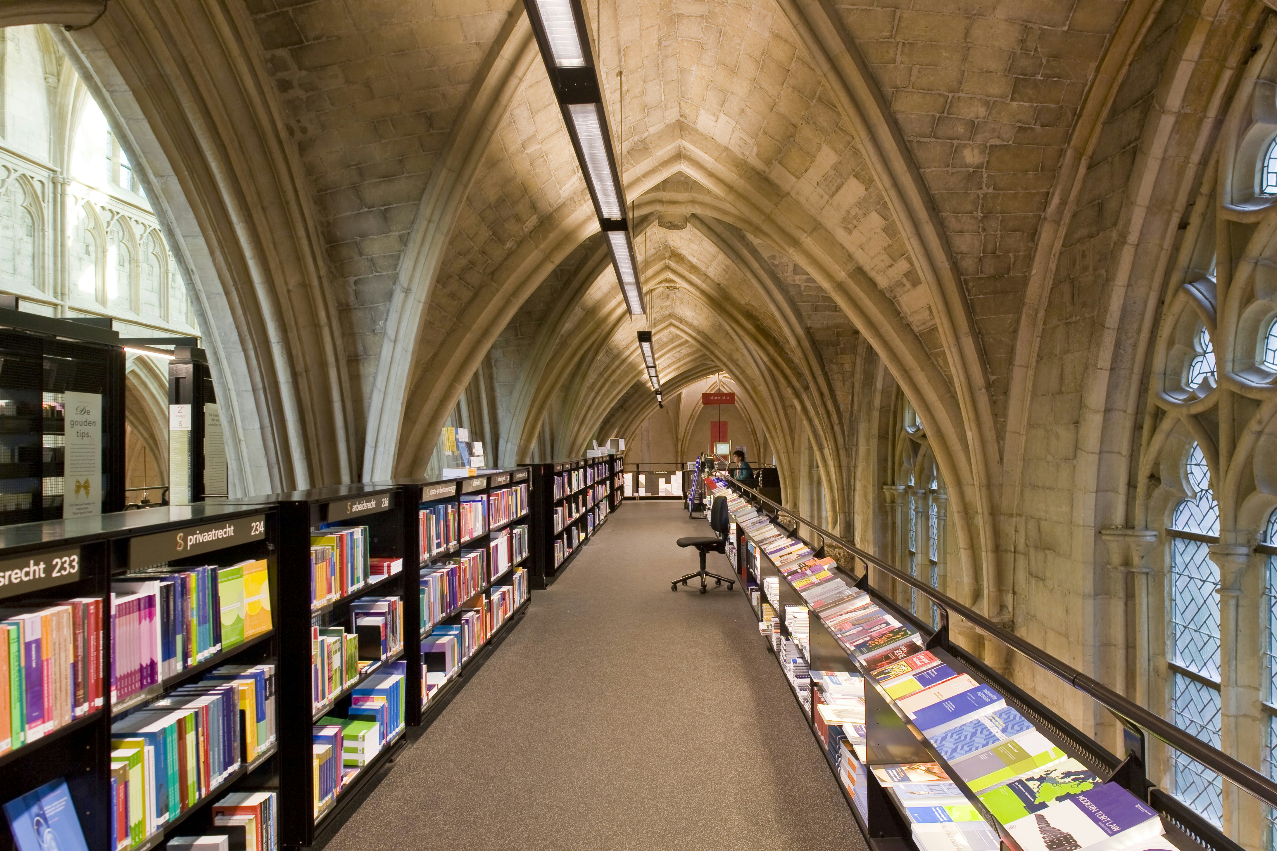 Dominicanerkerk: Interieur, overzicht van de tweede verdieping van het grote zwarte boekmeubel in de zuidelijke zijbeuk, gezien richting het koor